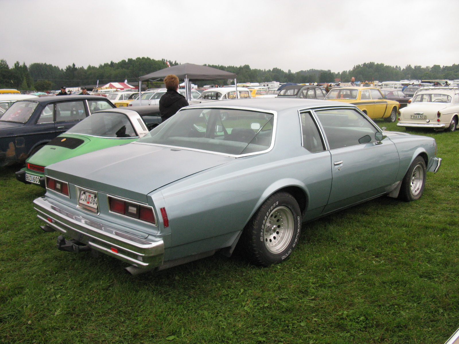 Chevrolet Impala Coupé 1977